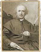 Una stampa dell'Abate Agostino Dal Pozzo Prünner